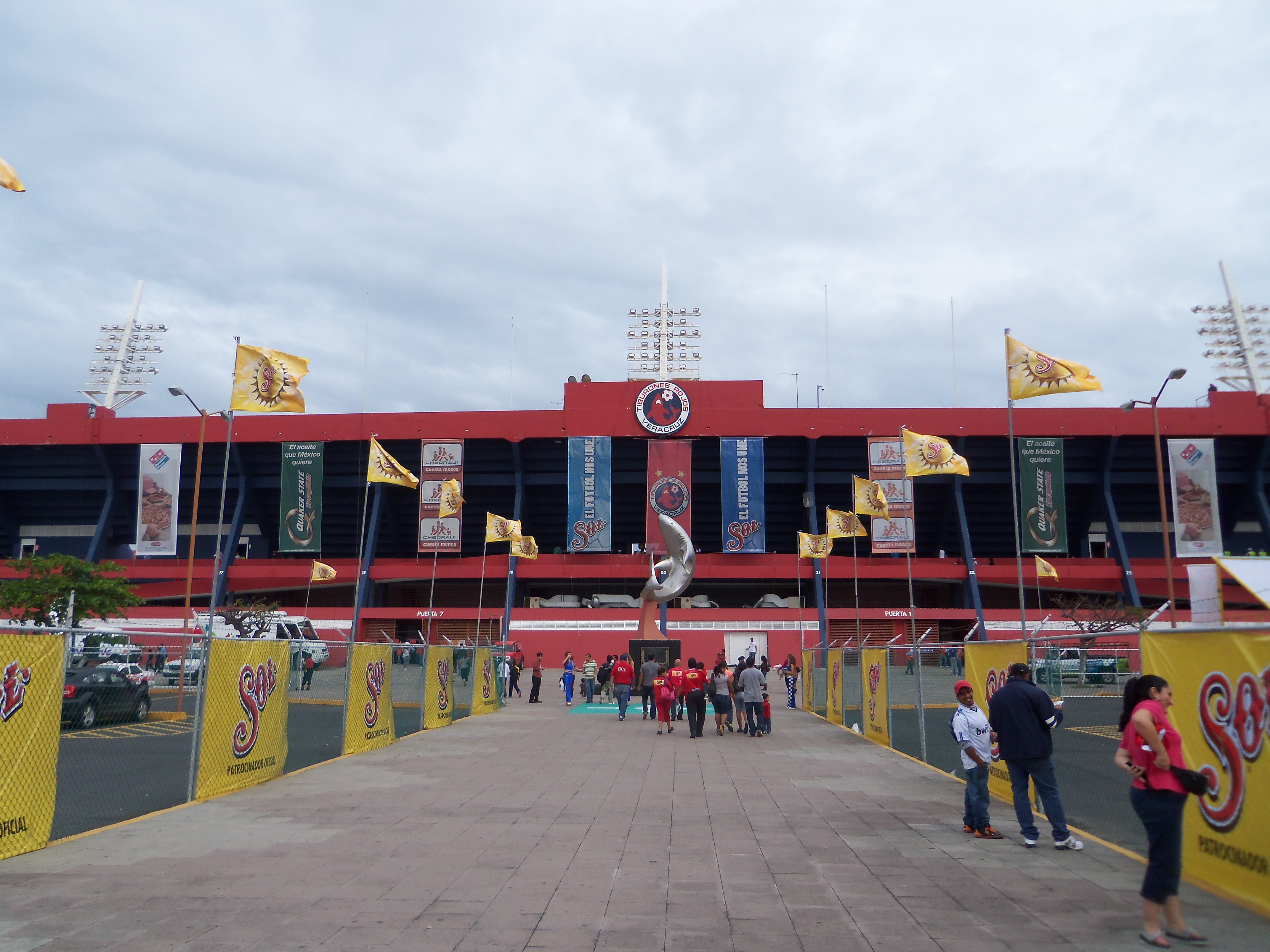 Vista desde el acceso principal al estadio